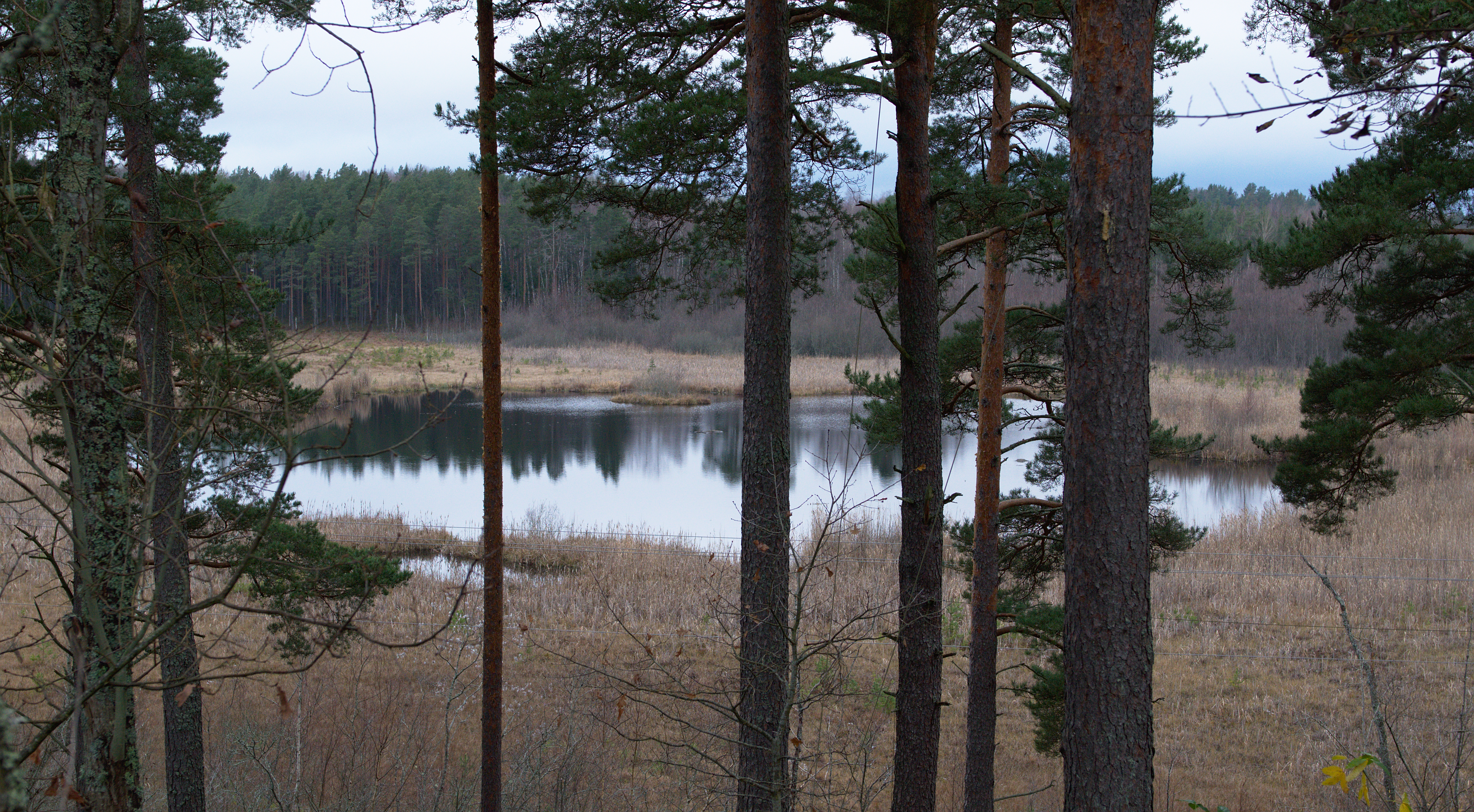 Tacktorpssjön i Eskilstuna kommun, sedd från öster.